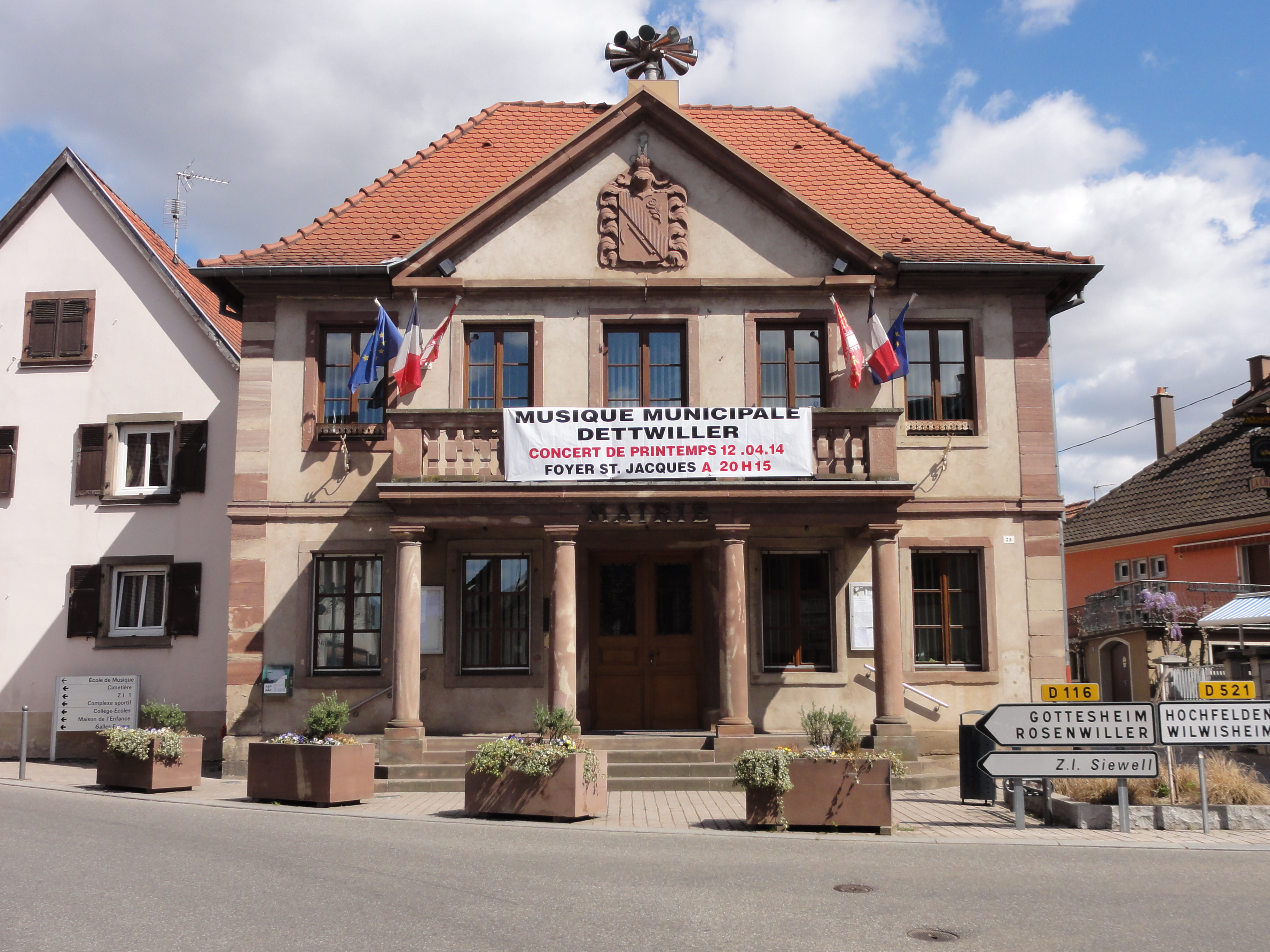 Alsace, Bas-Rhin, Dettwiller, Mairie (XIXe-XXe). .